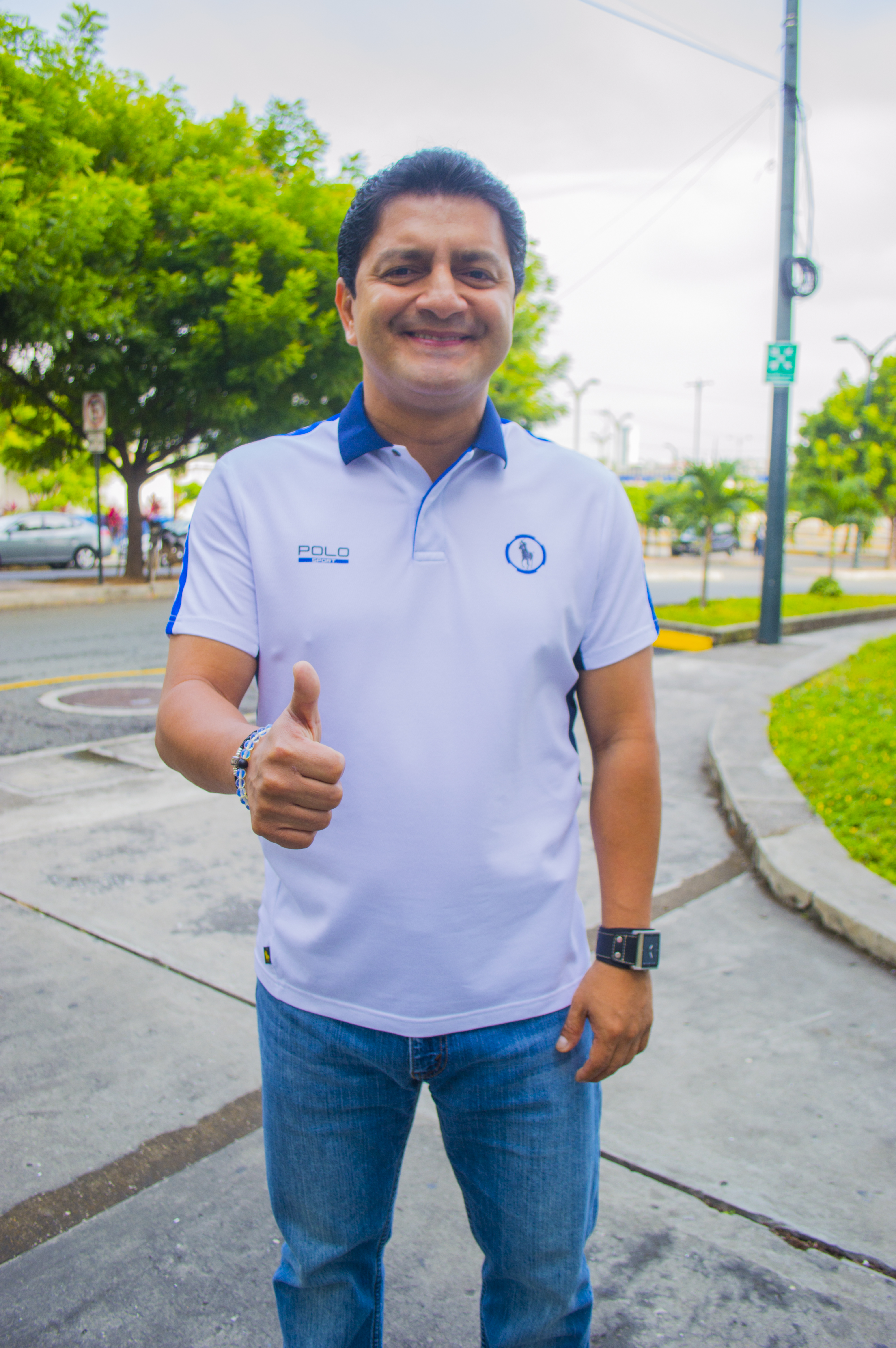 Martín Calle es un actor e imitador ecuatoriano de teatro y televisión. Aquí está fuera del Teatro Centro de Arte de Guayaquil en 2017.